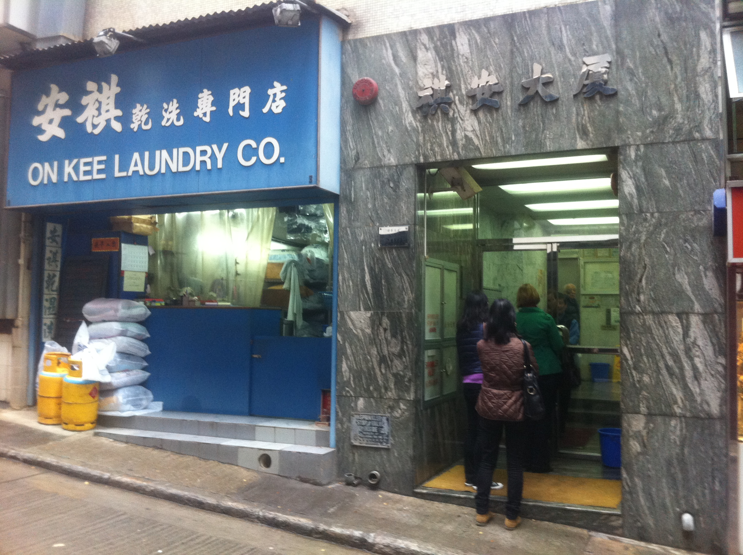 中文（香港）: 上環 荷李活道 200 號 磅巷